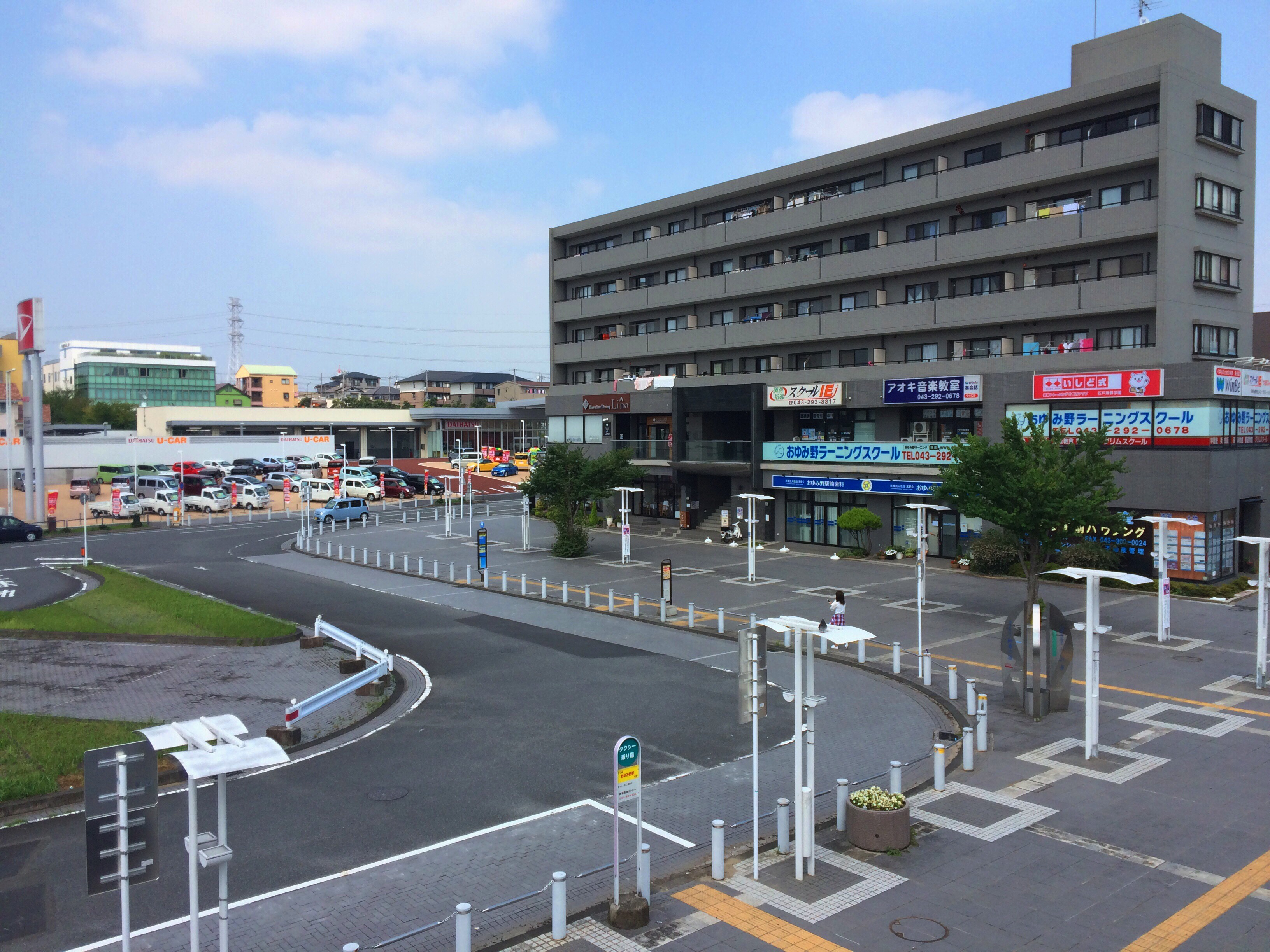 おゆみ野駅ターミナル